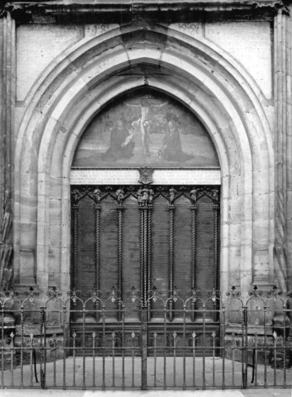 Wittenberg, Schlosskirche, Hauptportal, Thesentür Zentralbild Schmiljun 24.3.1953 Historisches Material aus der 450-jährigen Geschichte der Martin-Luther-Universität Halle-Wittenberg Thesentür an der Schlosskirchen in Wittenberg. 1760 verbrannte die hölzerne Thesentür, die 1517 mit Luthers Hammerschlägen den Beginn der Reformation erlebt hatte.